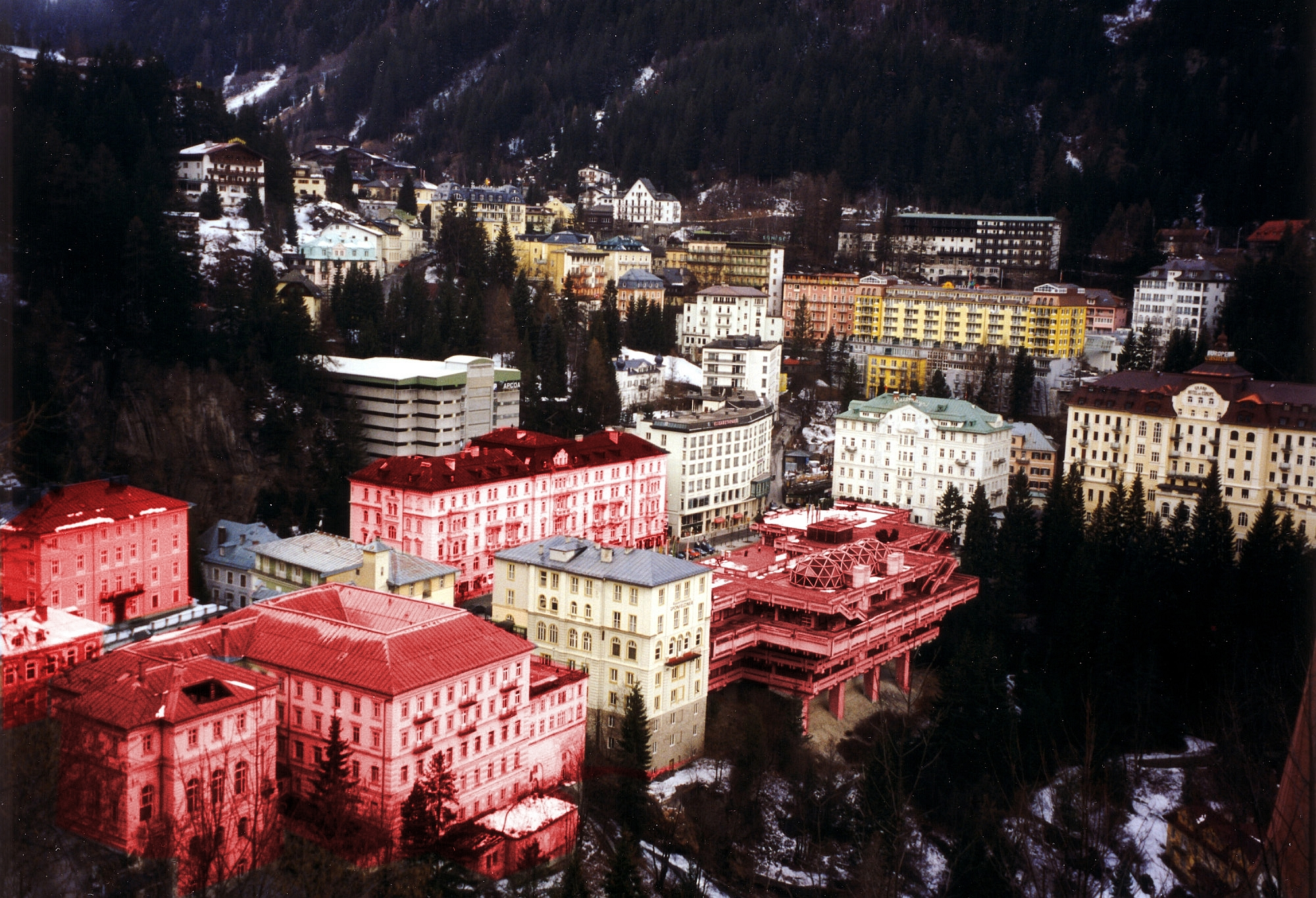 Bad Gastein leerstehende Gebäude, rot untermalt